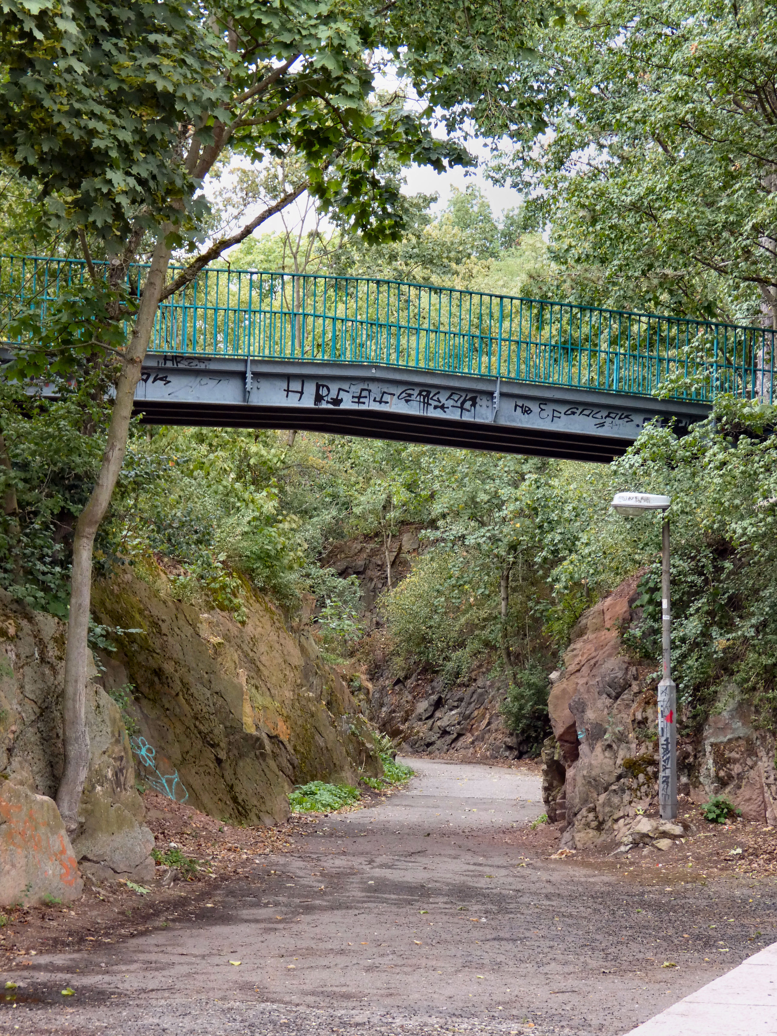 Fußgängerbrücke in der Galgenbergschlucht, Halle (Saale)